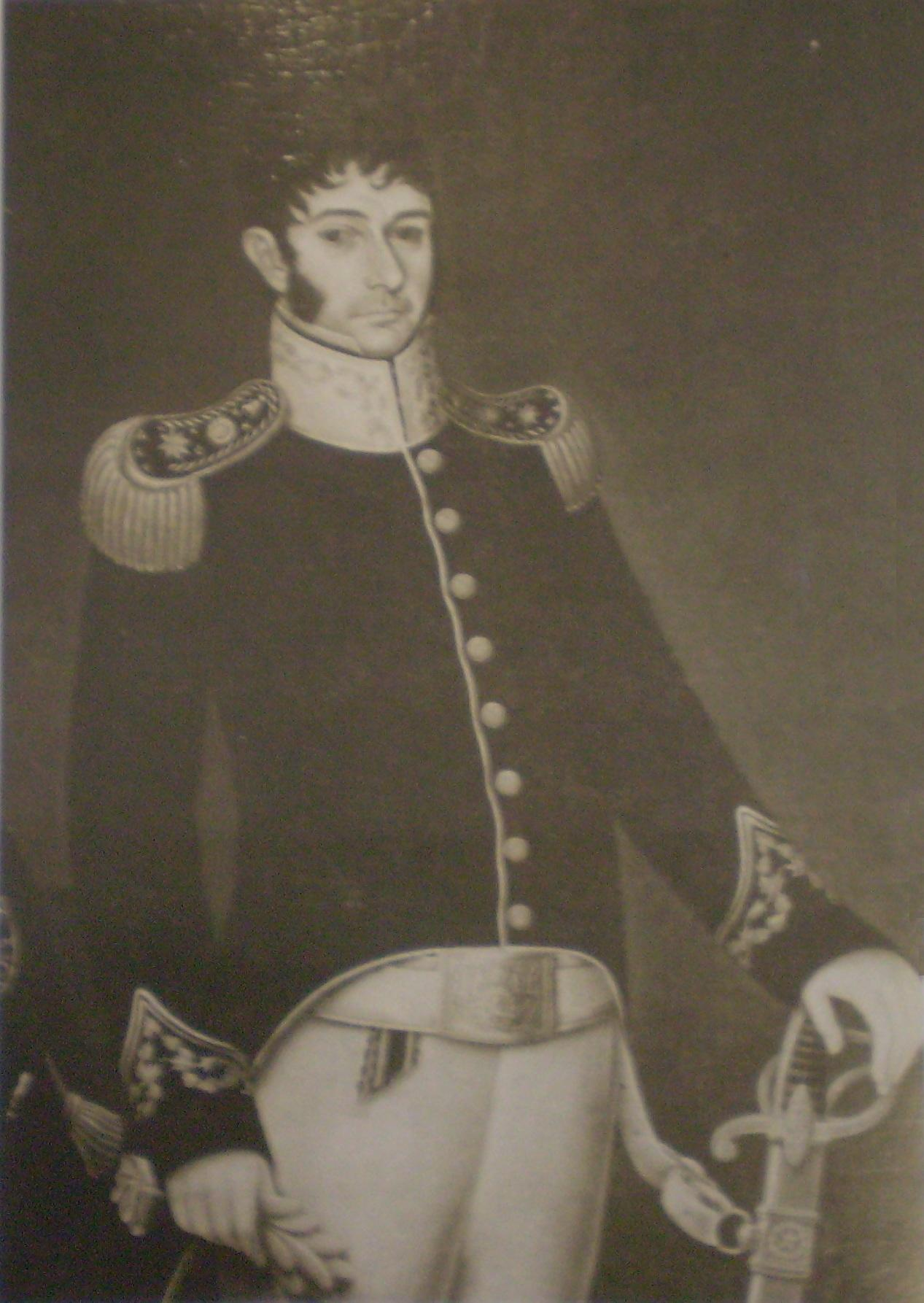 Nicolás Rodríguez Peña. Óleo de J. Gil de Castro. MHN